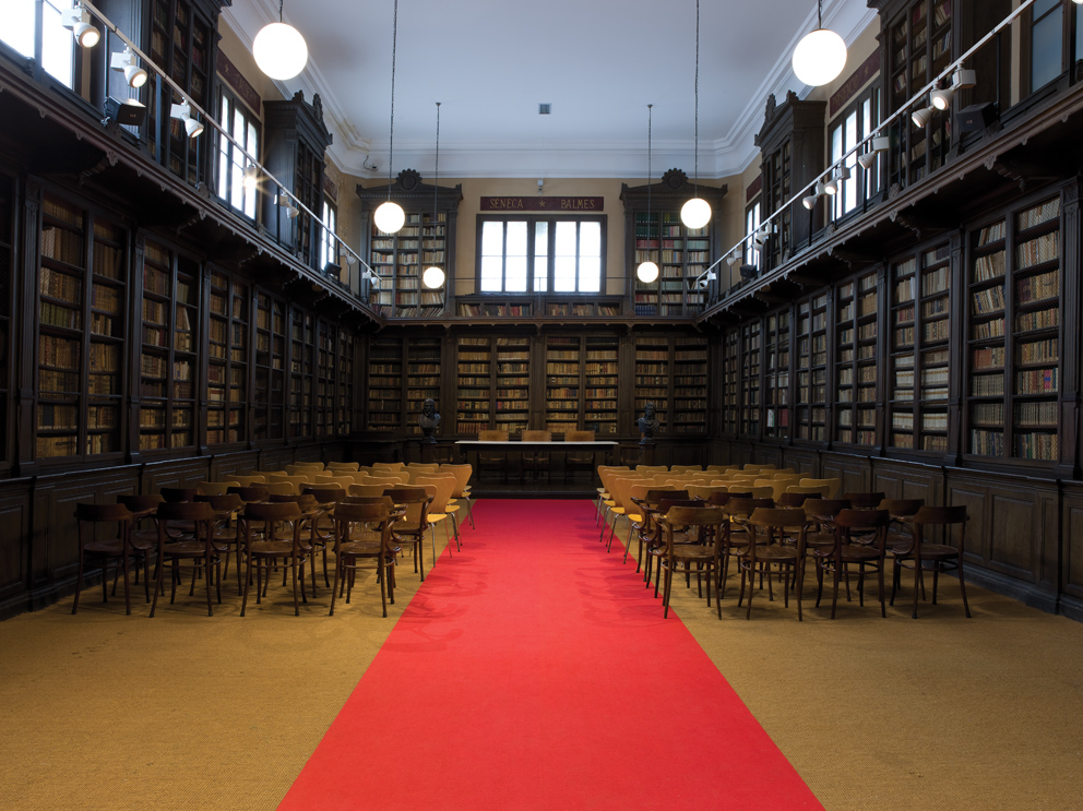 LaBiblioteca Museu Víctor Balaguer va néixer a finals del segle XIX amb la voluntat d’oferir al públic l’oportunitat de veure reunides múltiples col·leccions d’art, llibres i etnografia que Víctor Balaguer havia atresorat al llarg de la seva vida.